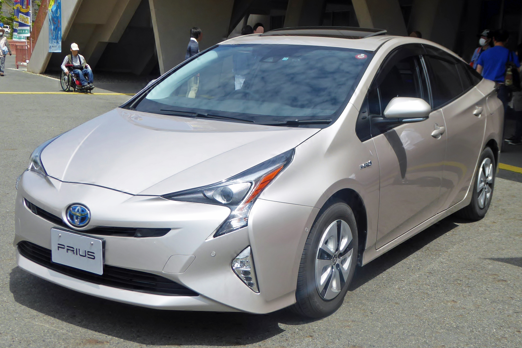 DAA-ZVW51-AHXHB型トヨタ・プリウスAプレミアムをフロントから撮影。